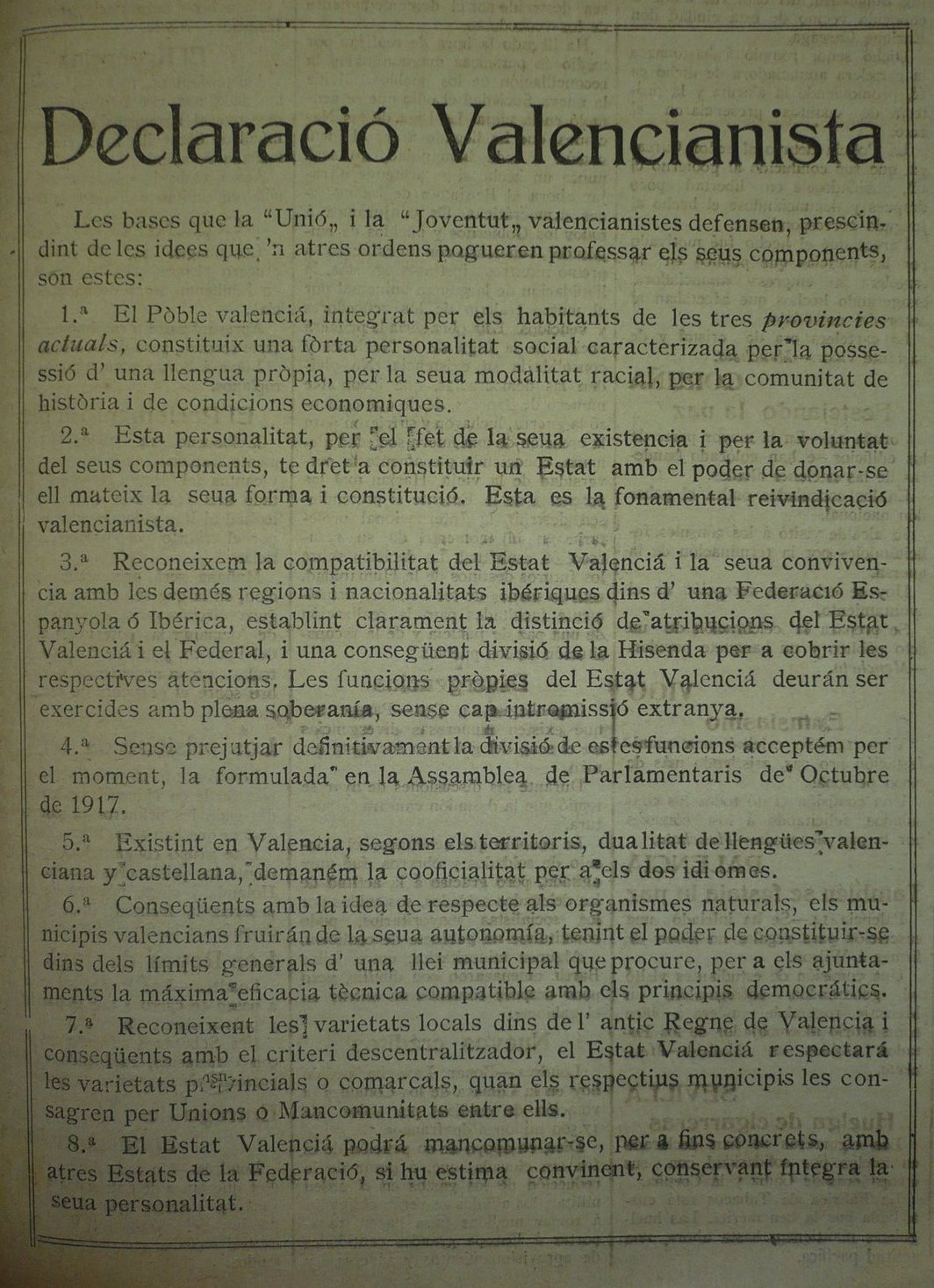 Text publicat a La Correspondencia de Valencia en 1918